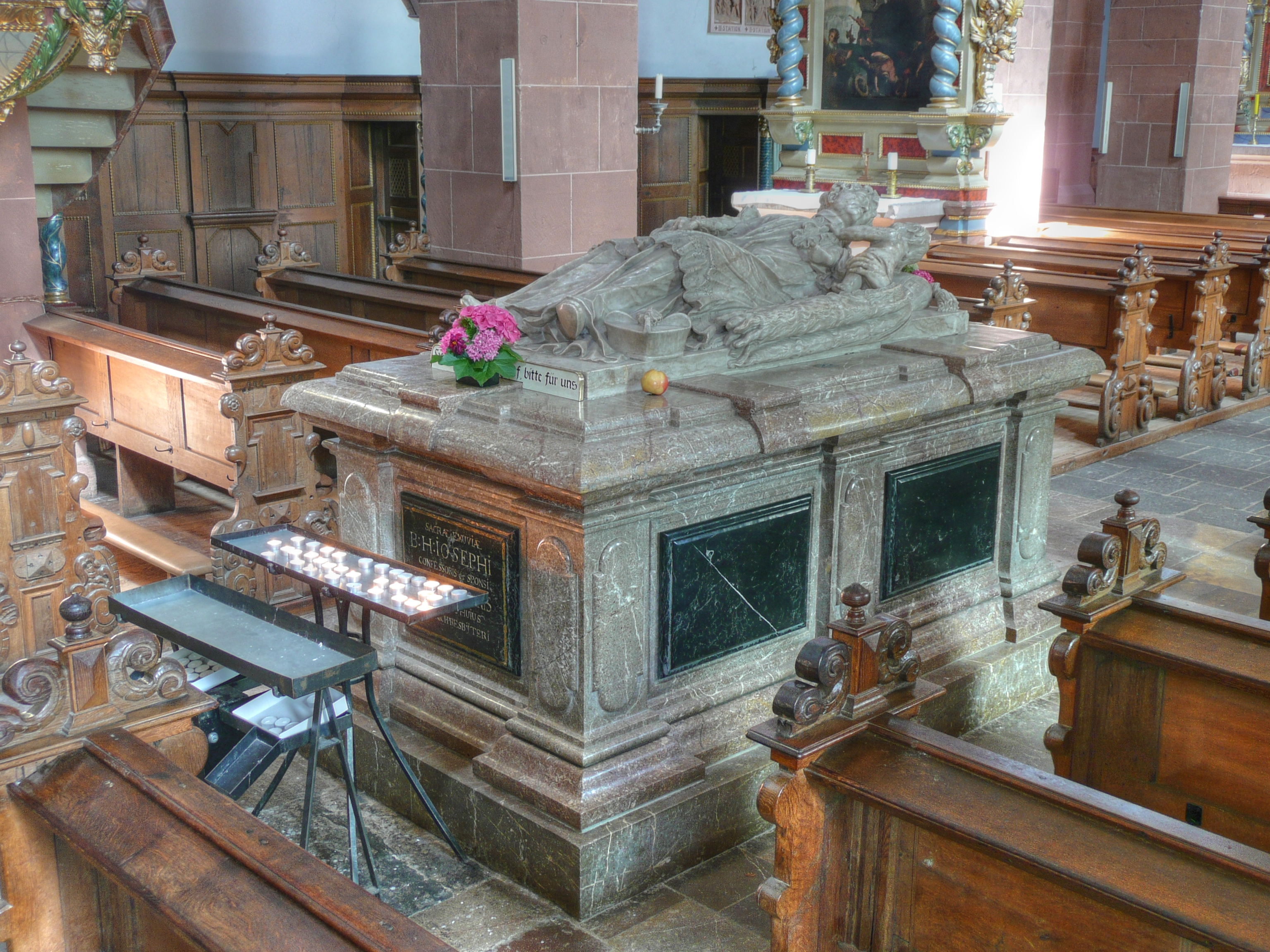 Grab des Hl. Hermann Joseph von Steinfeld in der Steinfelder Basilika